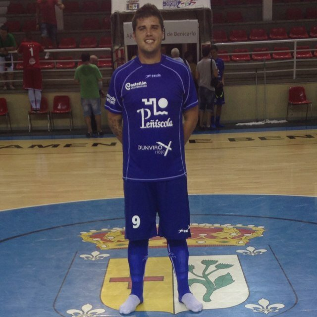 Juanqui Temporada 2015